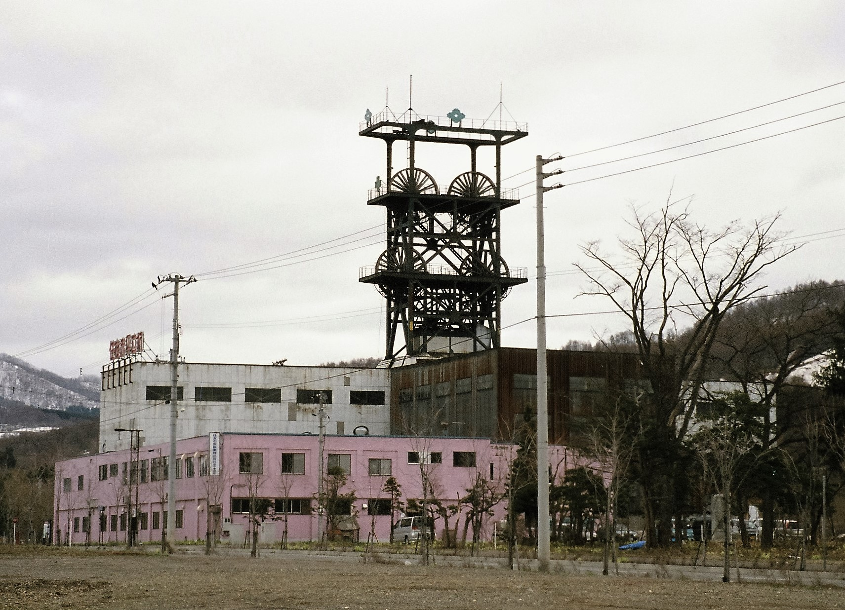 住友石炭鉱業赤平砿立坑（2006年5月）